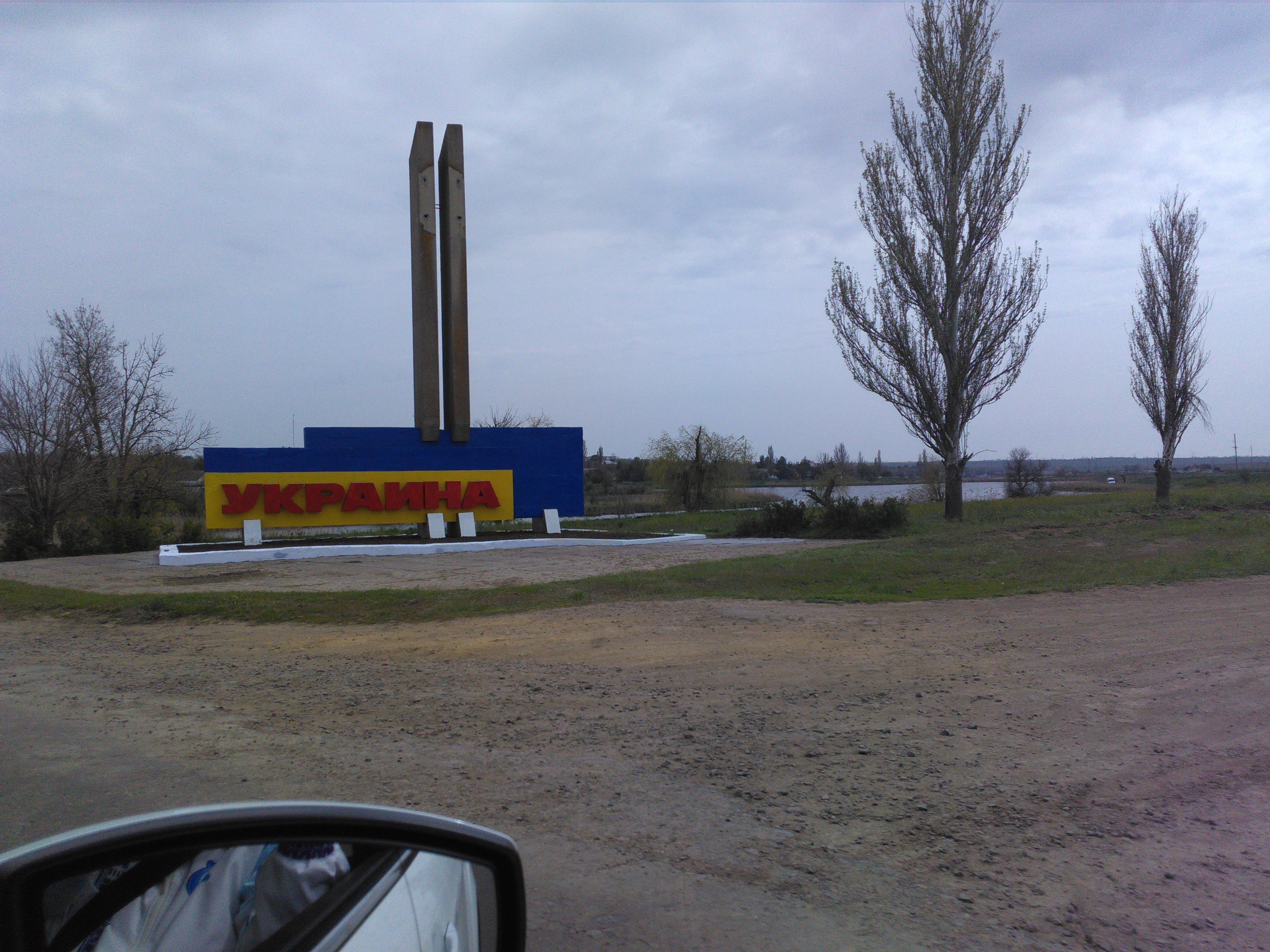 Кам'янка (Очаківський район), "Україна" - російською.